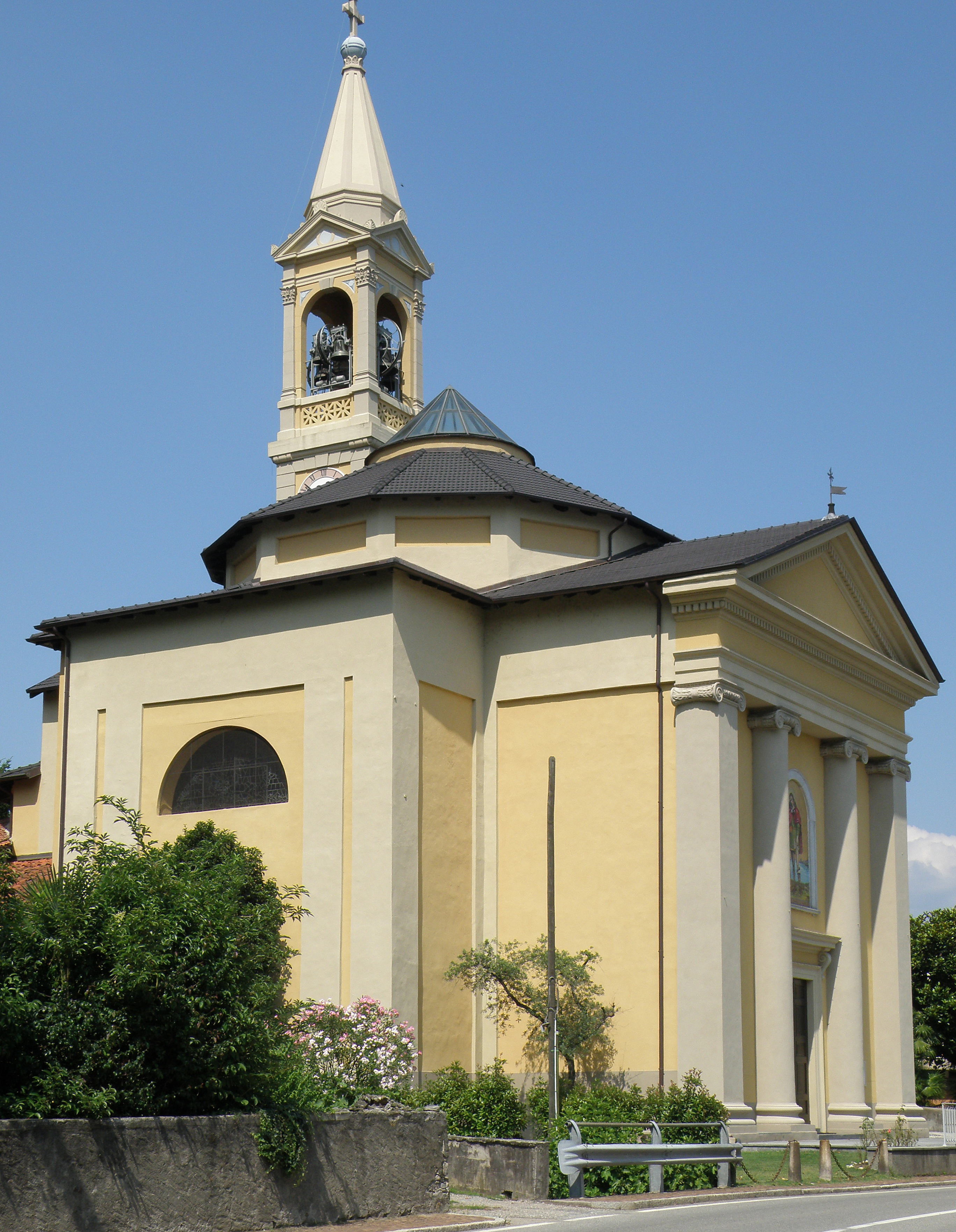 Solcio, fraz. del comune di Lesa (NO). Chiesa di San Rocco.